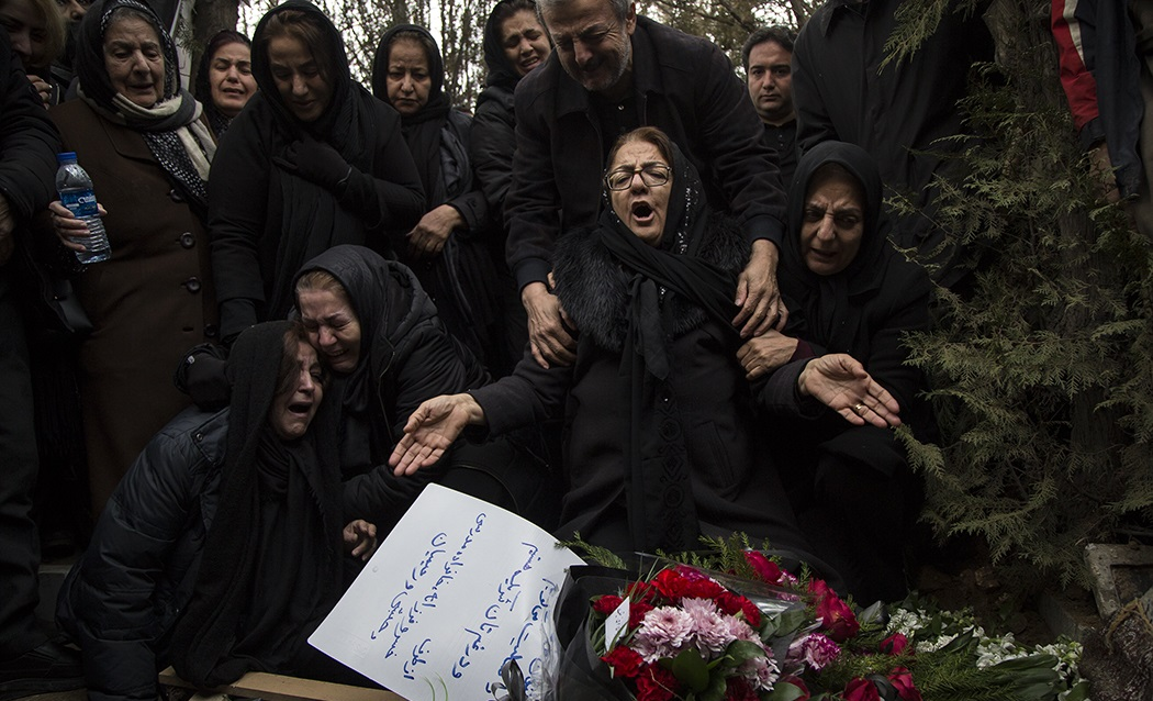 تشییع جنازهٔ قربانیان سقوط هواپیمای مسافربری اوکراینی بوئینگ ۷۳۷-۸۰۰ در سنندج